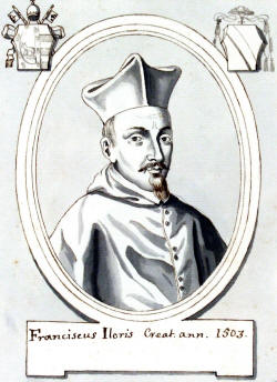 Cardenal Francisco Galcerán de Lloris y de Borja (1470-1506)